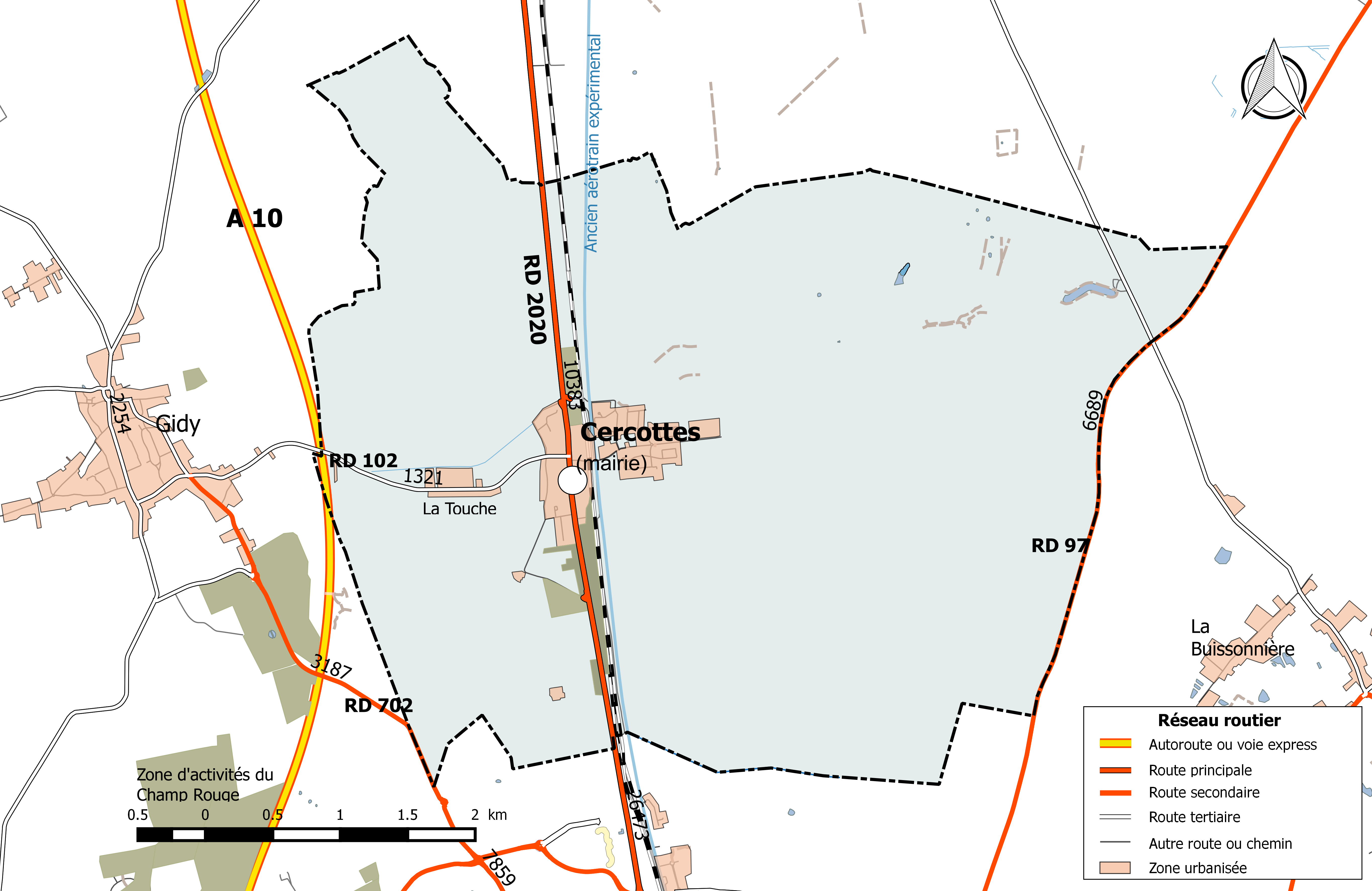 Carte du réseau routier de la commune de Cercottes.